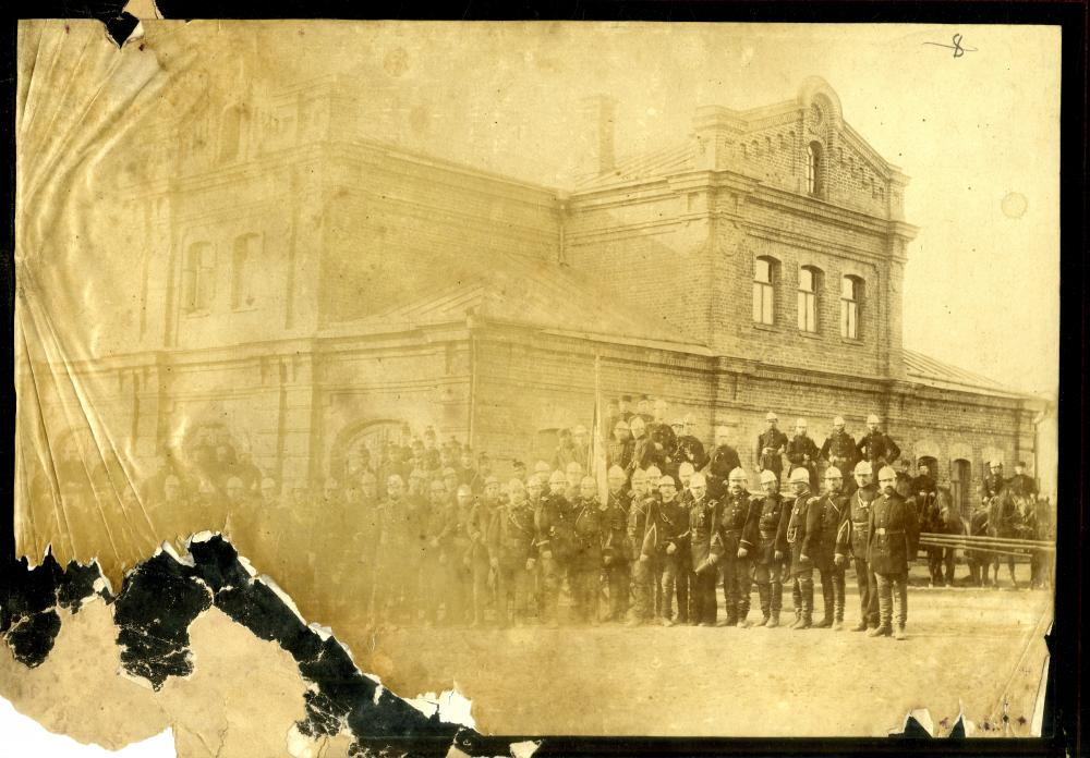 Беларуская (тарашкевіца): Менск (Miensk), Гарадзкі Вал (Haradzki Vał). Пажарнае дэпо